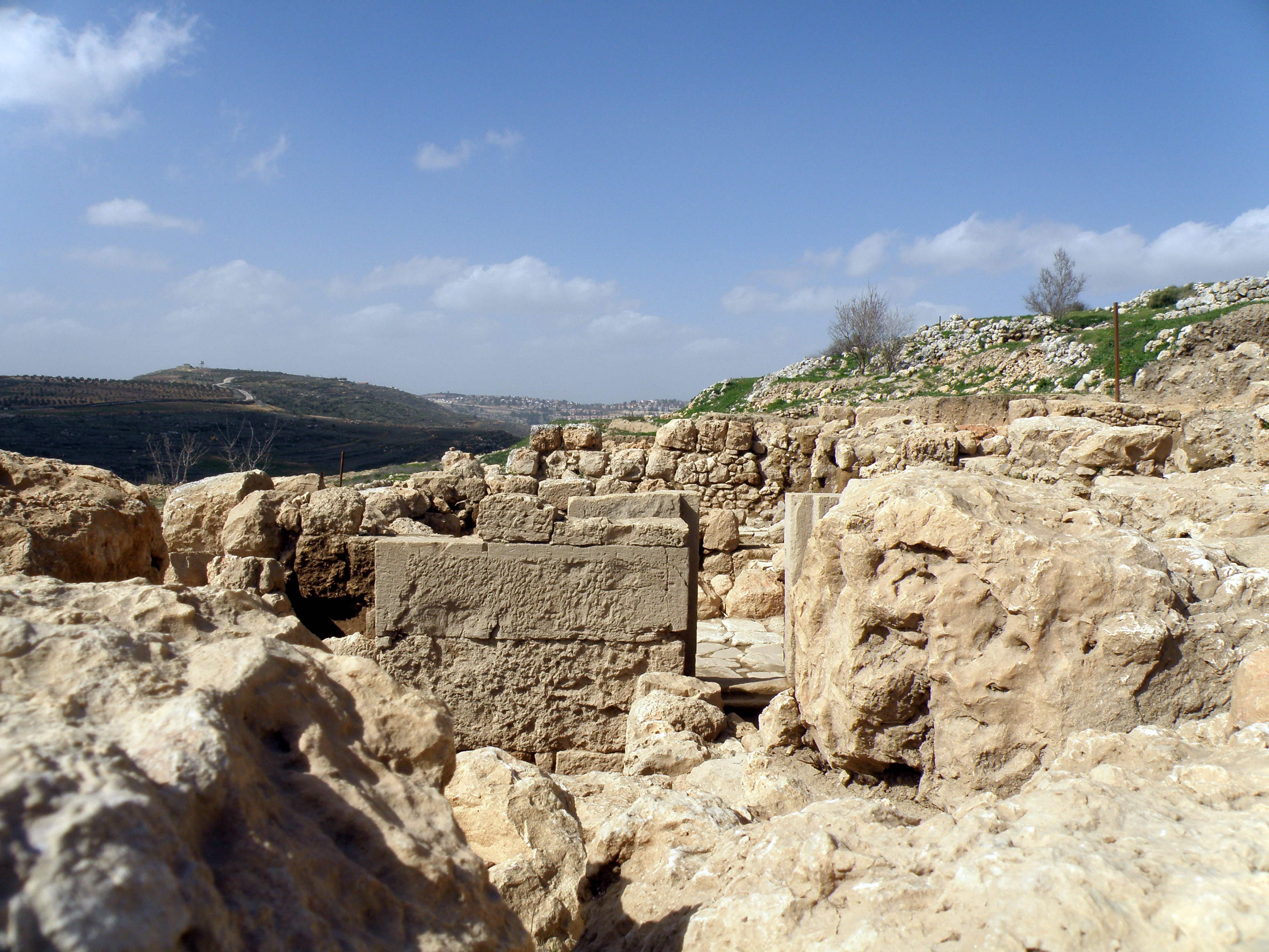 תל שילה